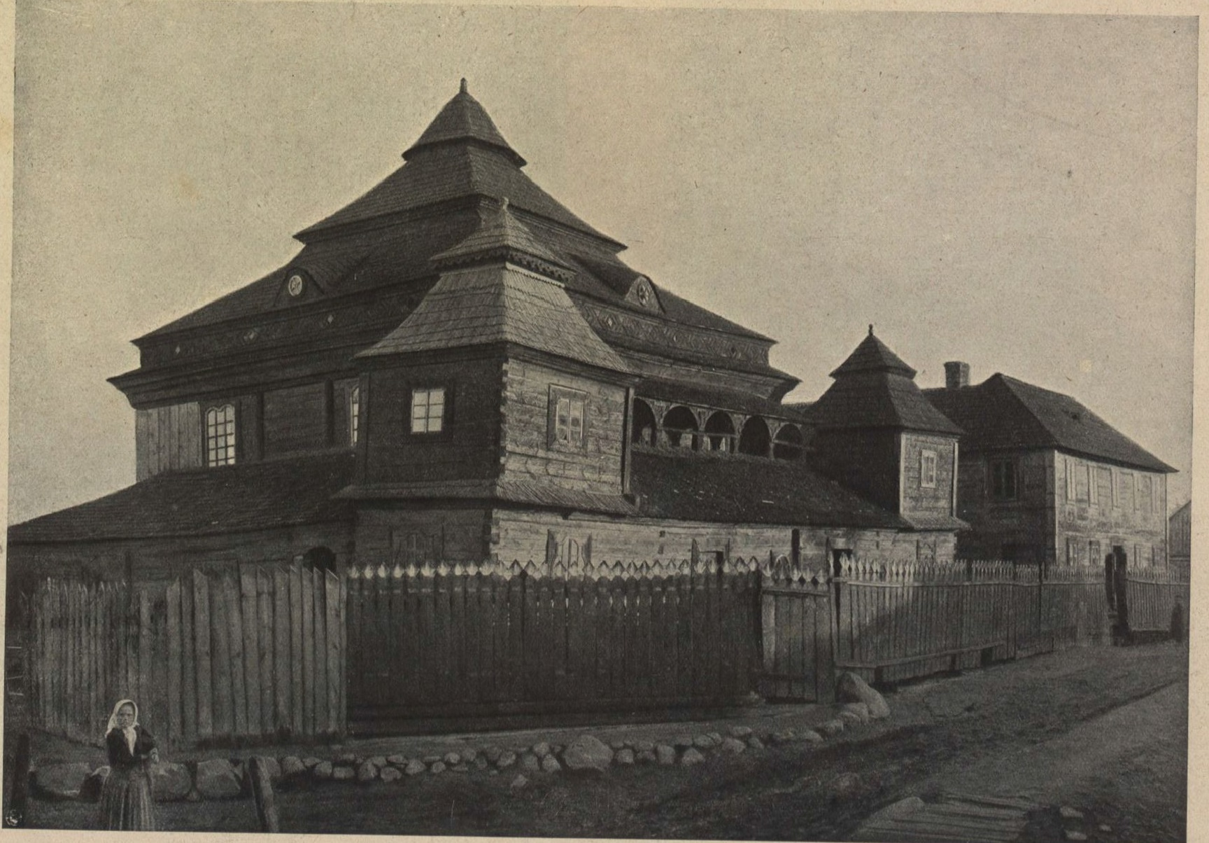 Materiały z wystawy Architektury Polskiej, urządzonej w 1915 r. staraniem Koła Architektów i Towarzystwa Opieki nad Zabytkami Przeszłości w Warszawie.